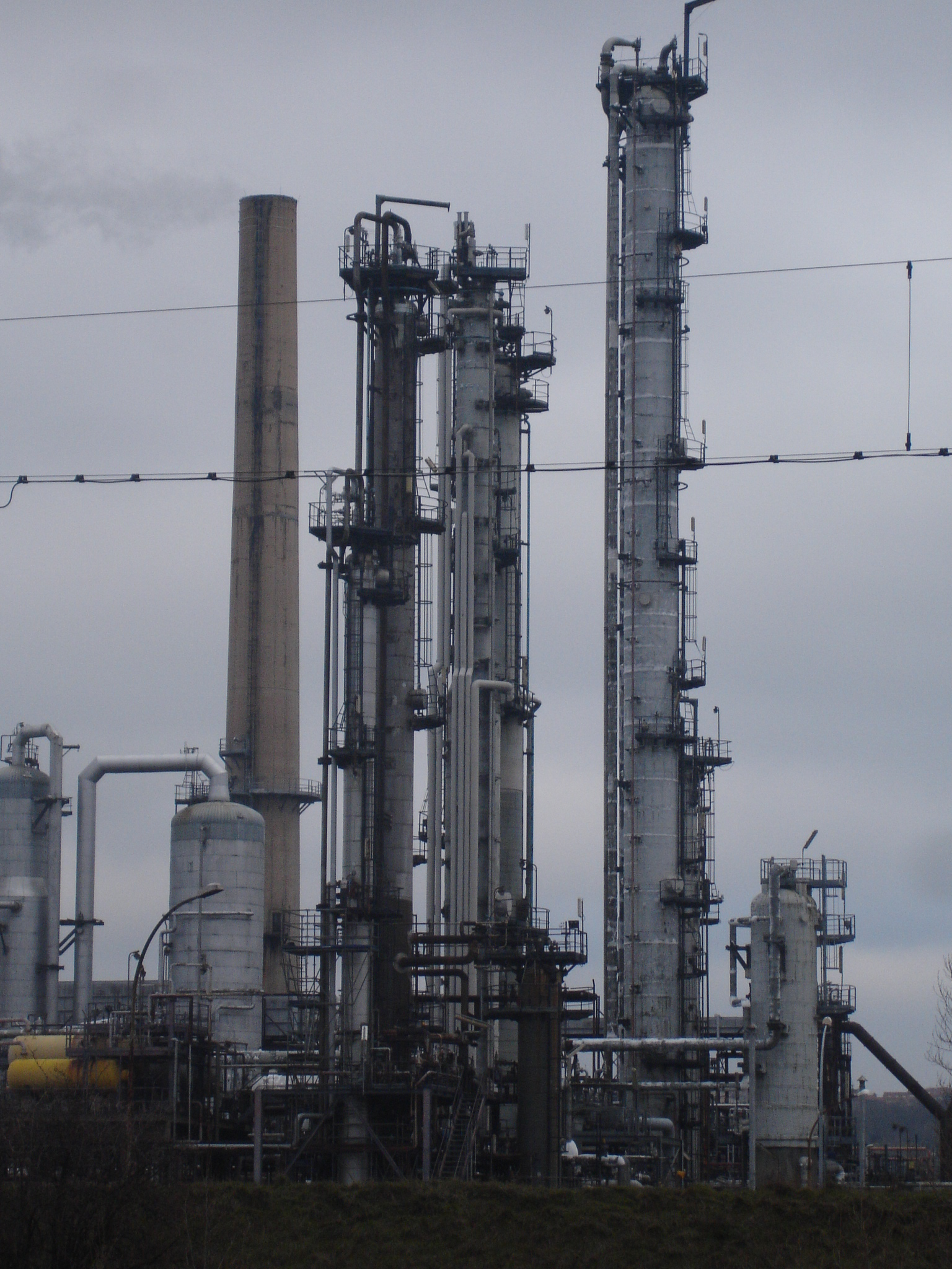 Raffinerie de Feyzin (69) "kraking" en gros plan